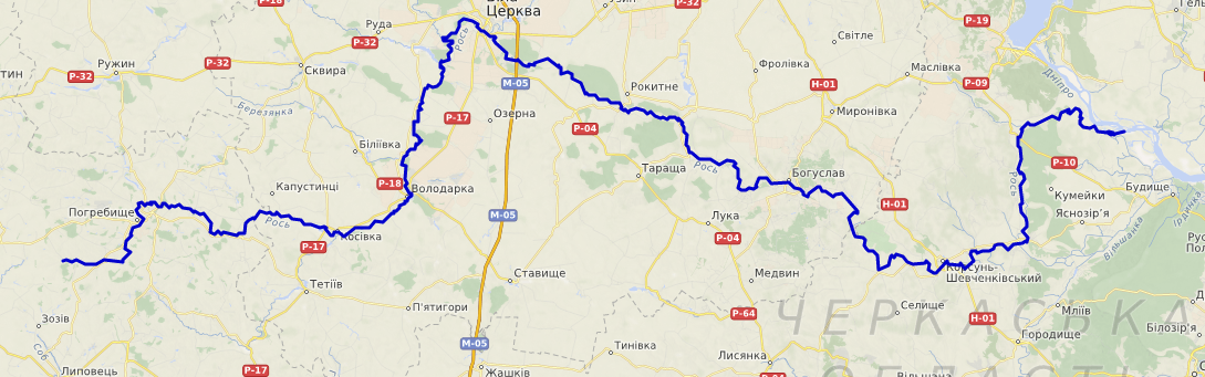 carte réalisée sur umap This map may be incomplete, and may contain errors. Don't rely solely on it for navigation.